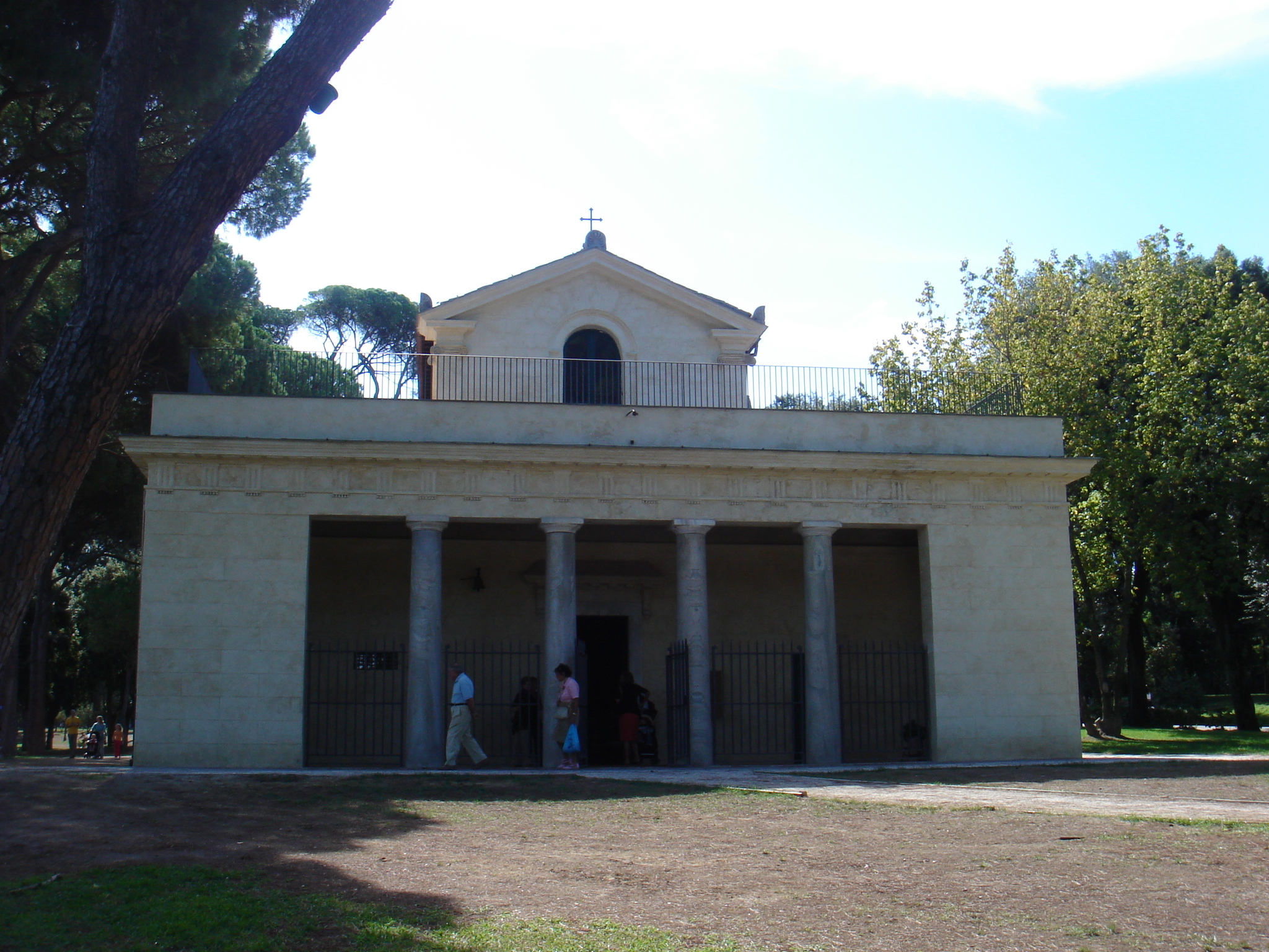 Roma, Villa Borghese: la chiesa dell'Immacolata nel Casino di Raffaello